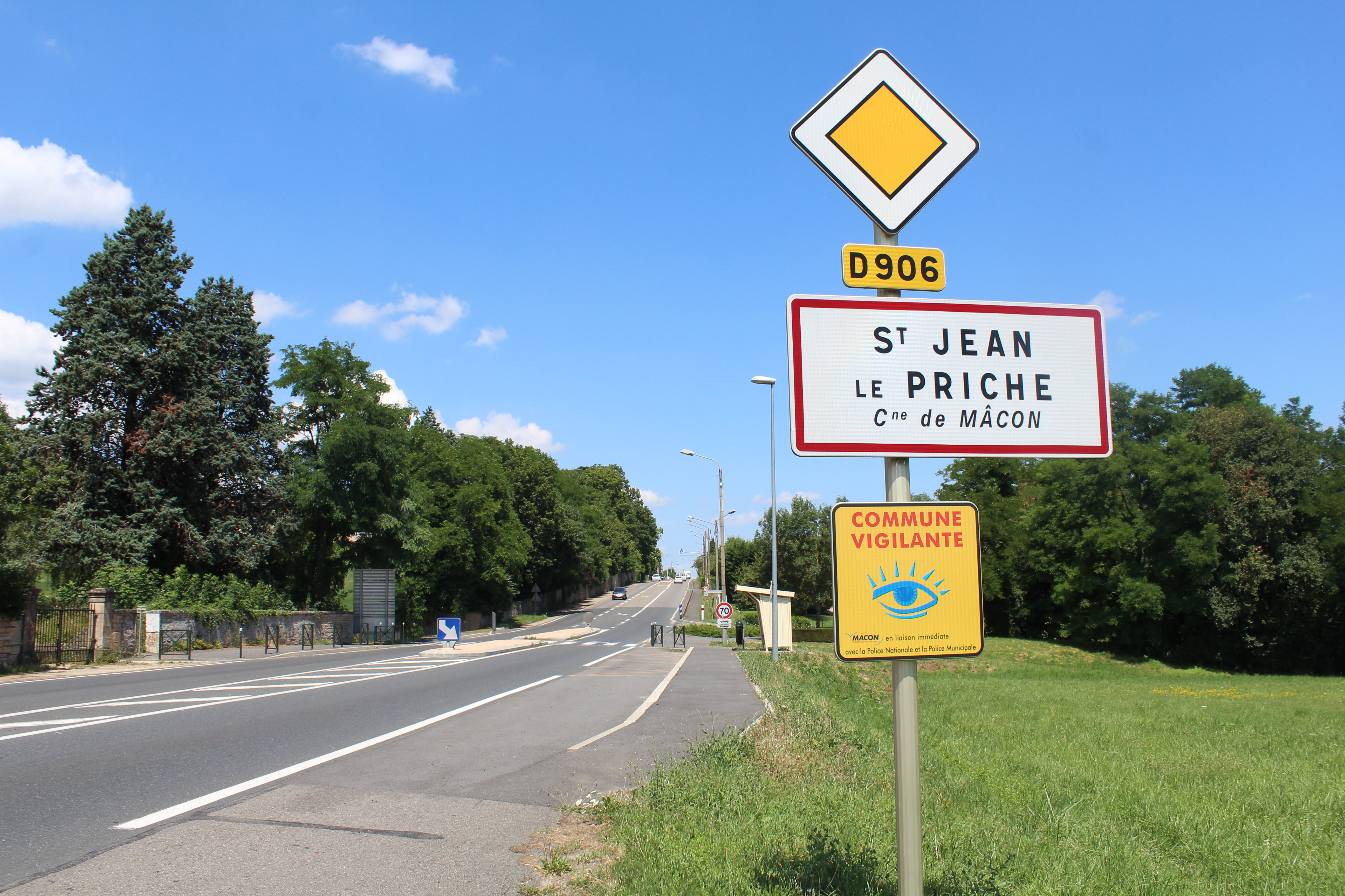 Panneau d'entrée dans Saint-Jean-de-Priche.